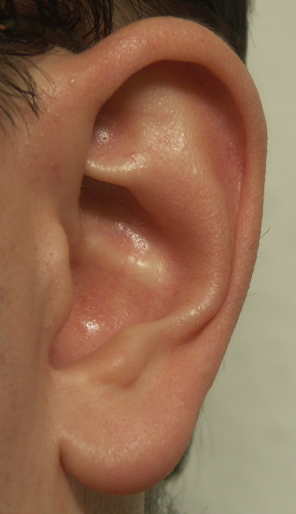 Ohr (Mensch)